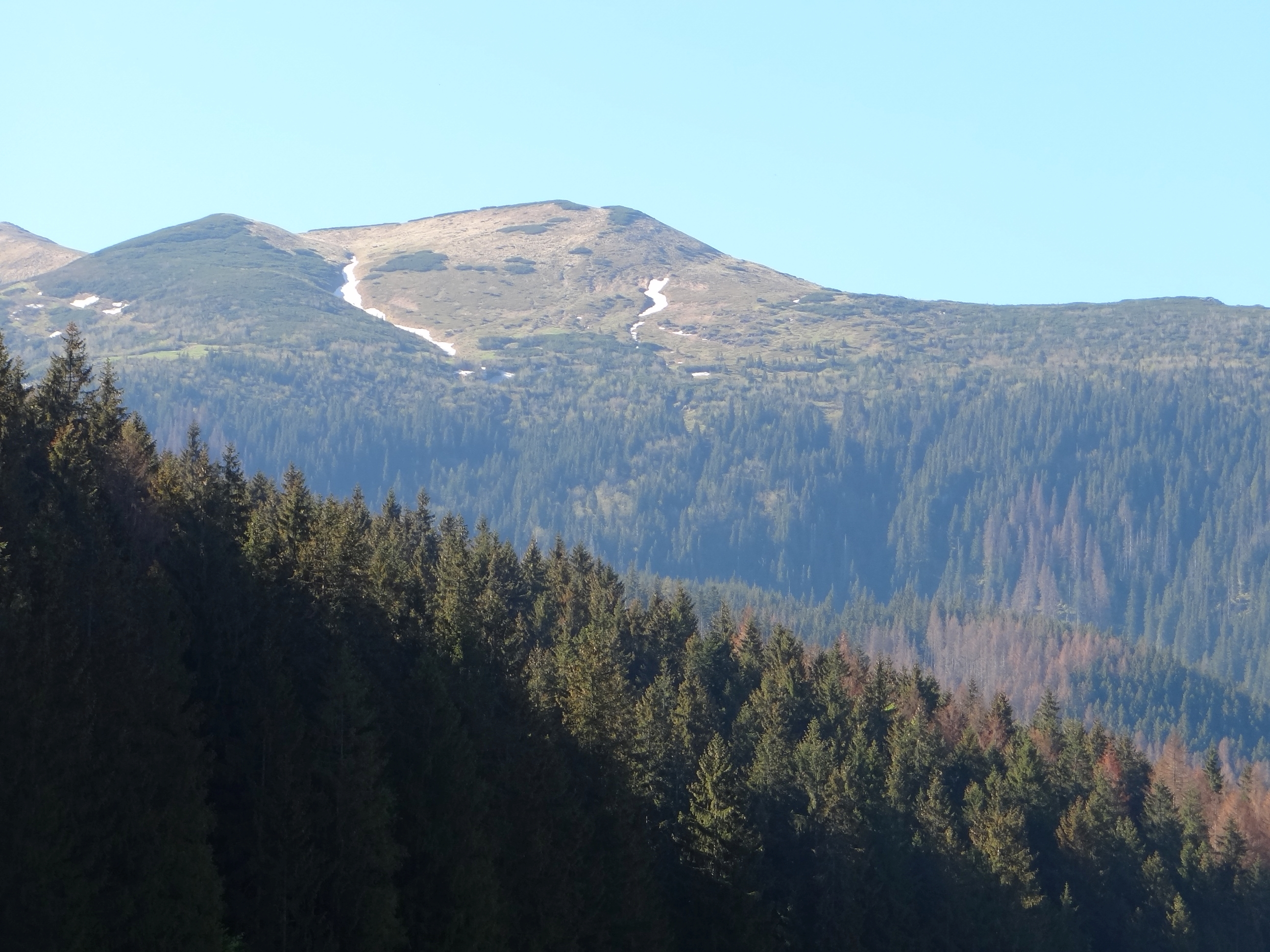 Upłaziańska Kopa